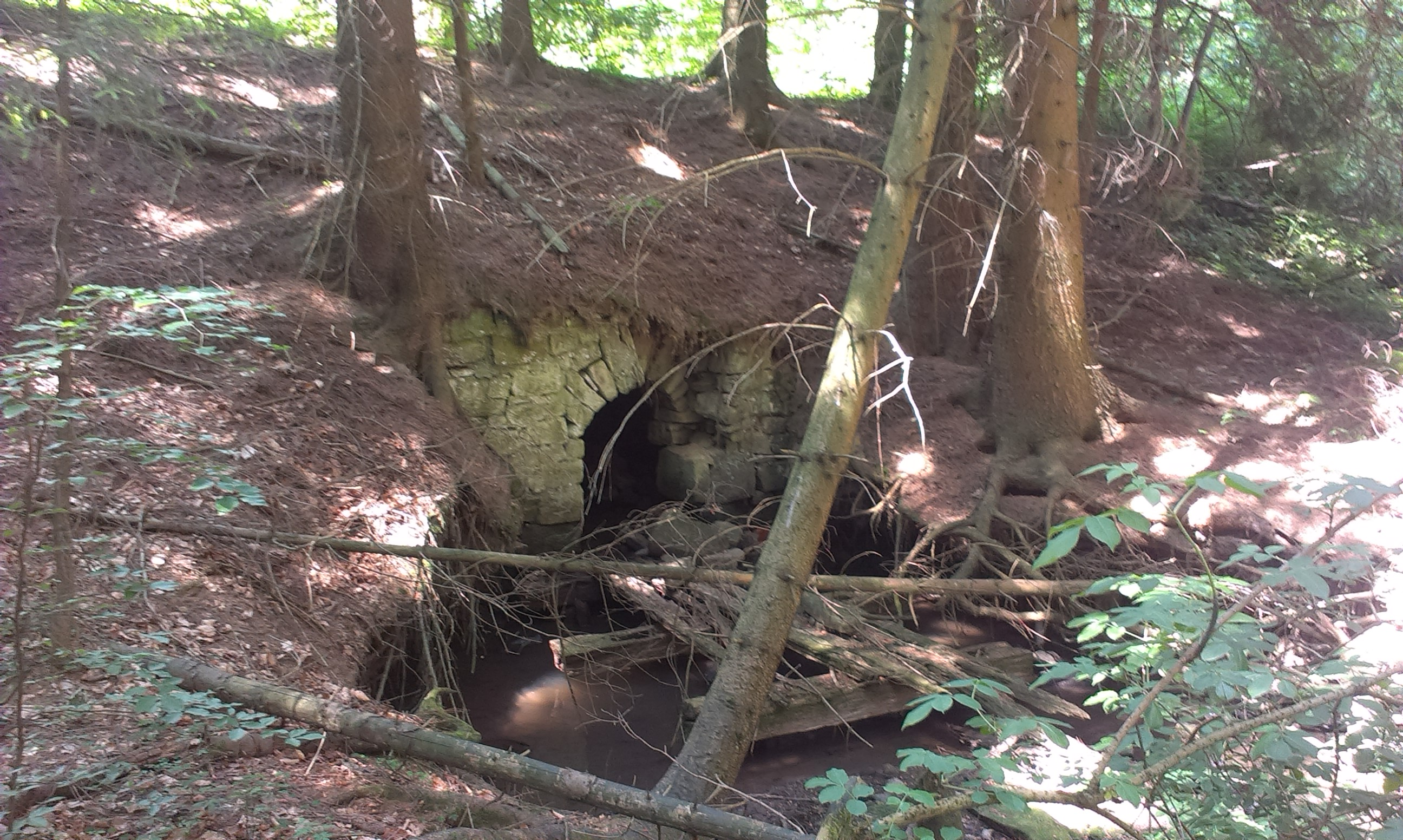 Klauza k plavení dříví, při silnici do Tesáku na říčce Juhyni, Rajnochovice.